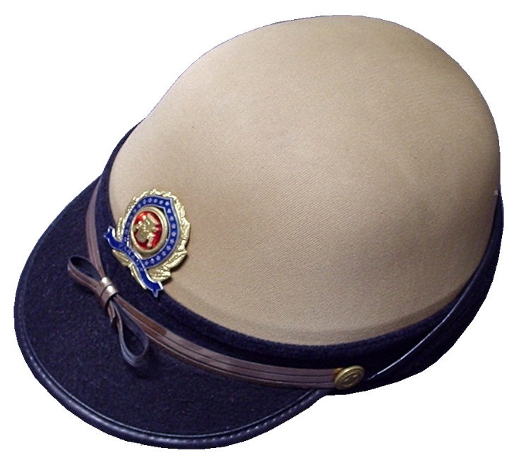 Casquete feminino da Polícia Militar do Paraná em 2001.